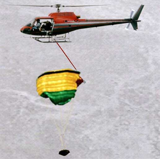 A few hundred feet above the vast, unoccupied grounds of the Utah Test and Training Range, the parachuting sample will be captured by a helicopter and gently delivered to the ground. Credit: NASA/JPL